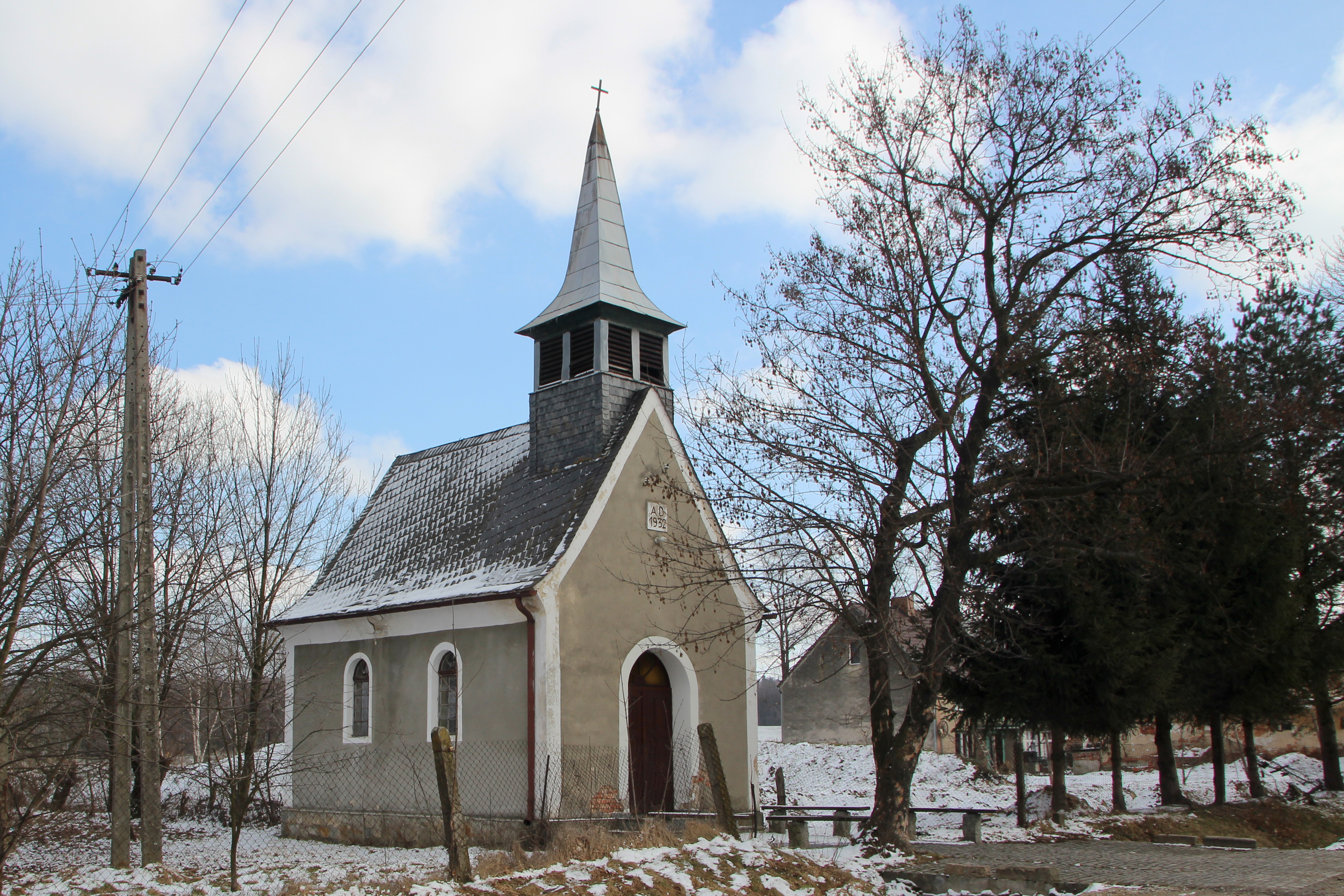 Kapica w Łączkach – część miejscowości Biskupów w Polsce, w województwie opolskim, w powiecie nyskim, w gminie Głuchołazy.